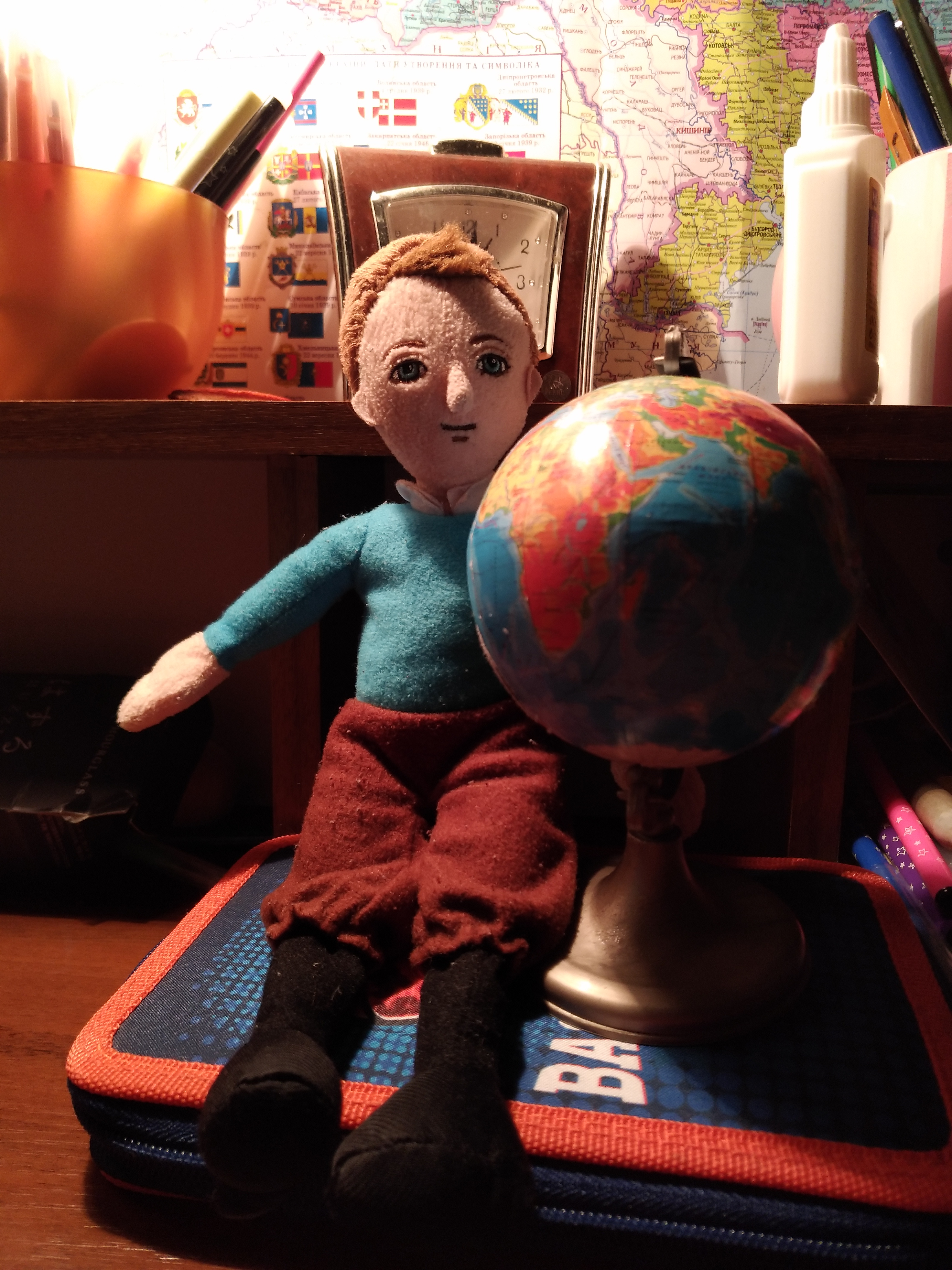 Іграшка журналіст Тентен